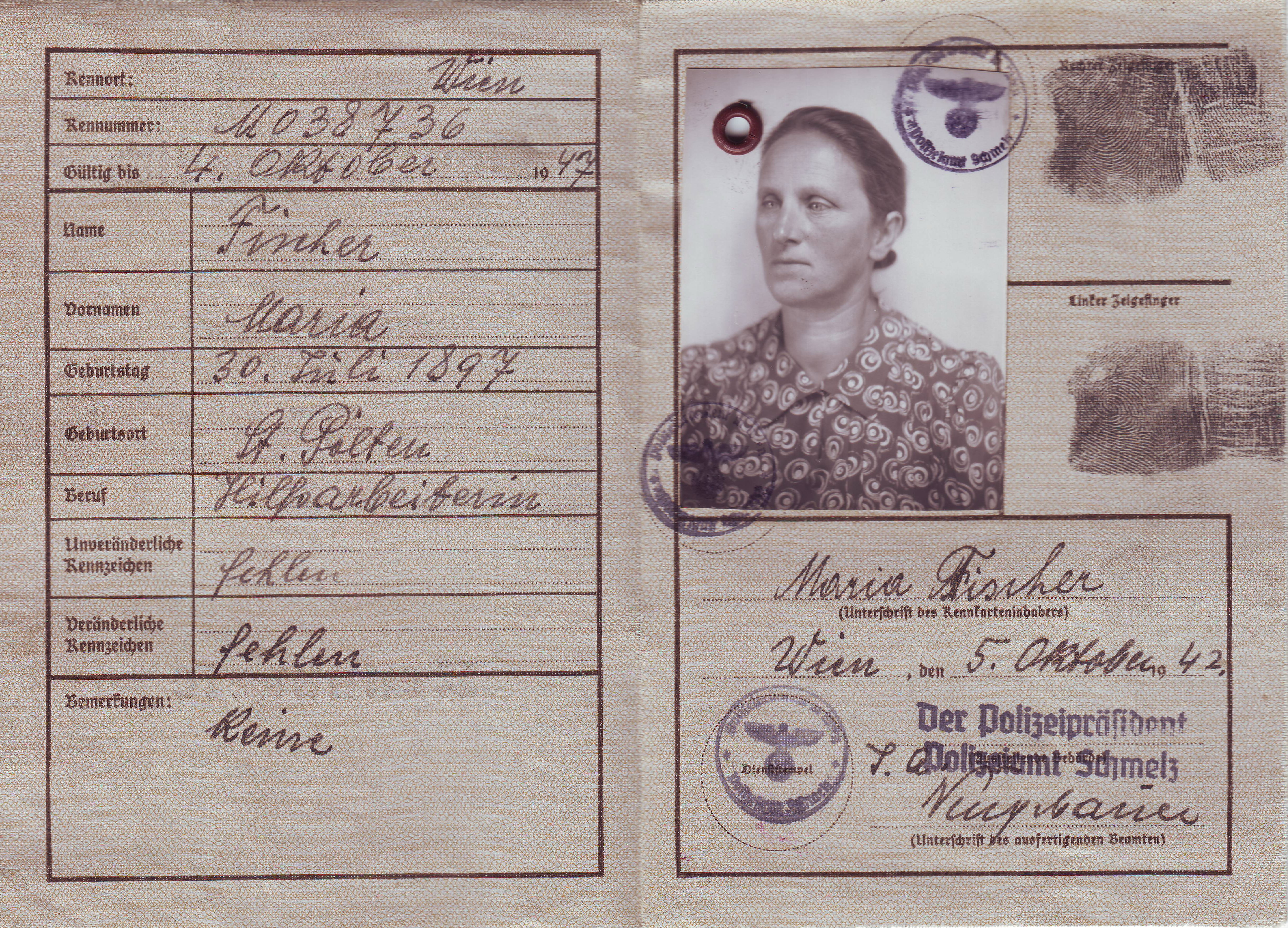 Kennkarte Deutsches Reich, Maria Fischer, 5. Oktober 1942. Das Original dieses Dokumentes befindet sich in Privatbesitz. Die Rechte befinden sich ausschließlich bei Dnalor_01.